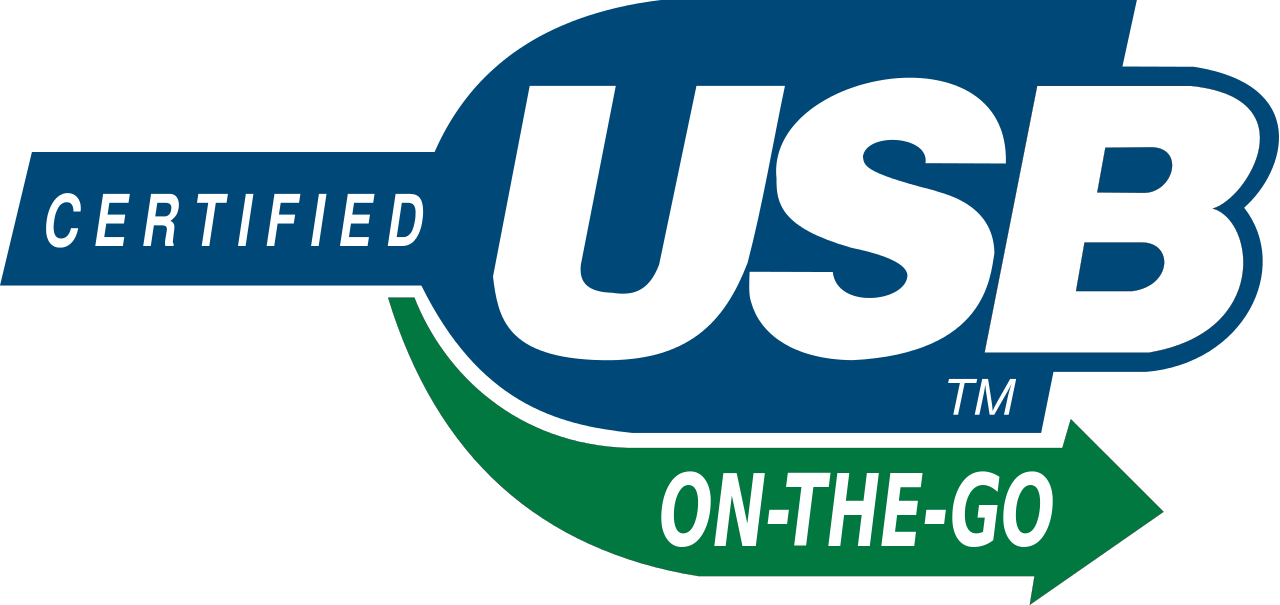 Symbol für USB On The Go (OTG) zertifizierte Geräte